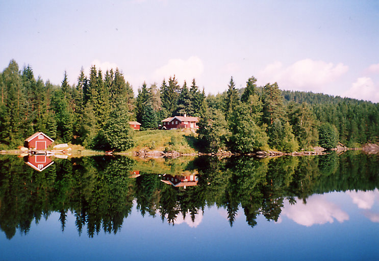 Vegår